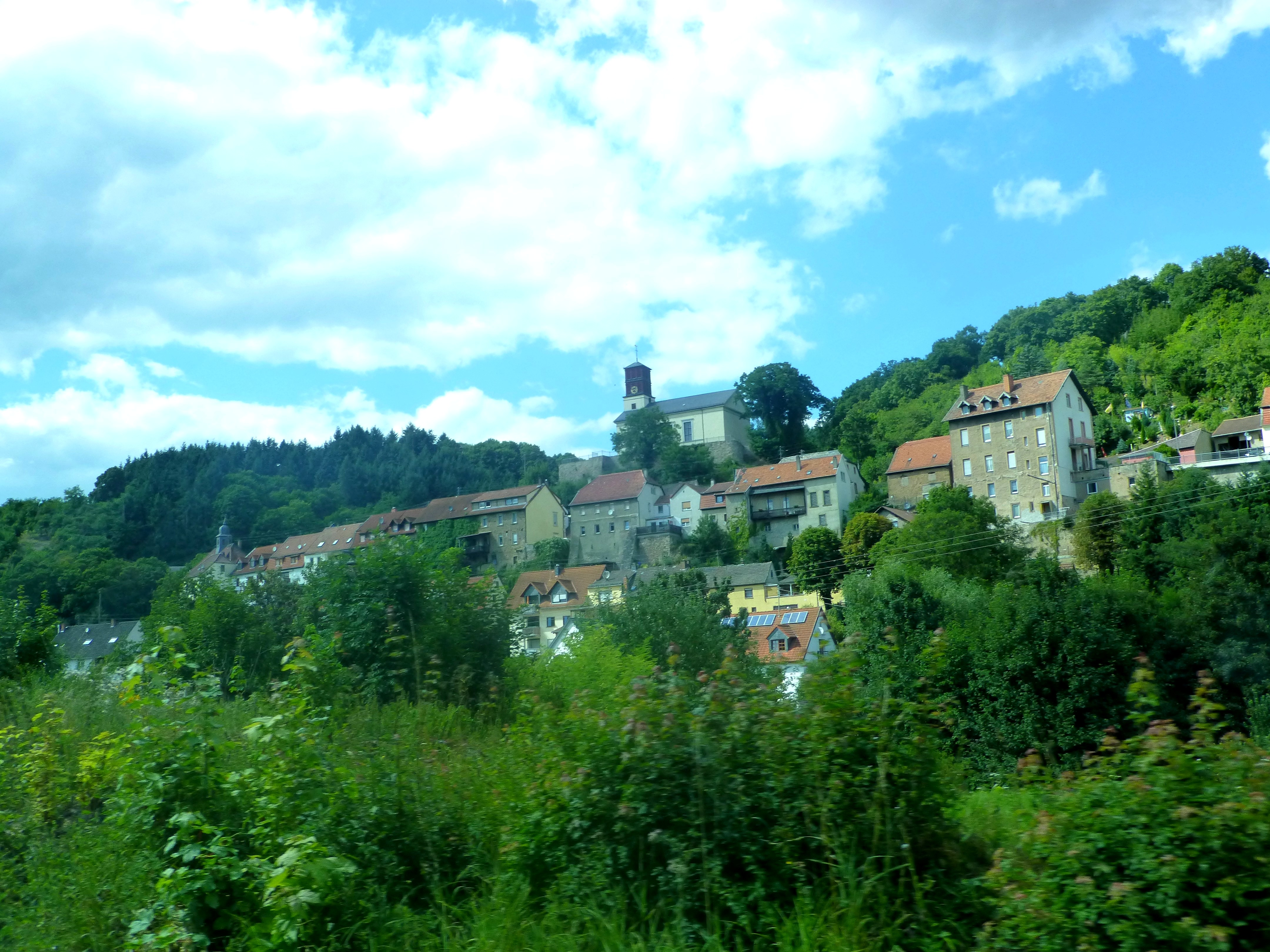 Die evangelische Pfarrkirche in Grumbach